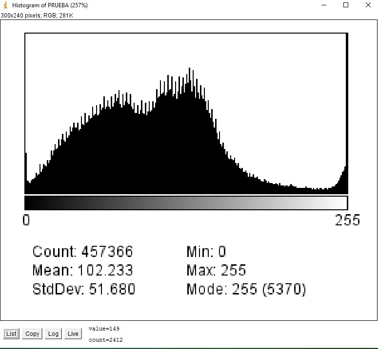 Histograma manual